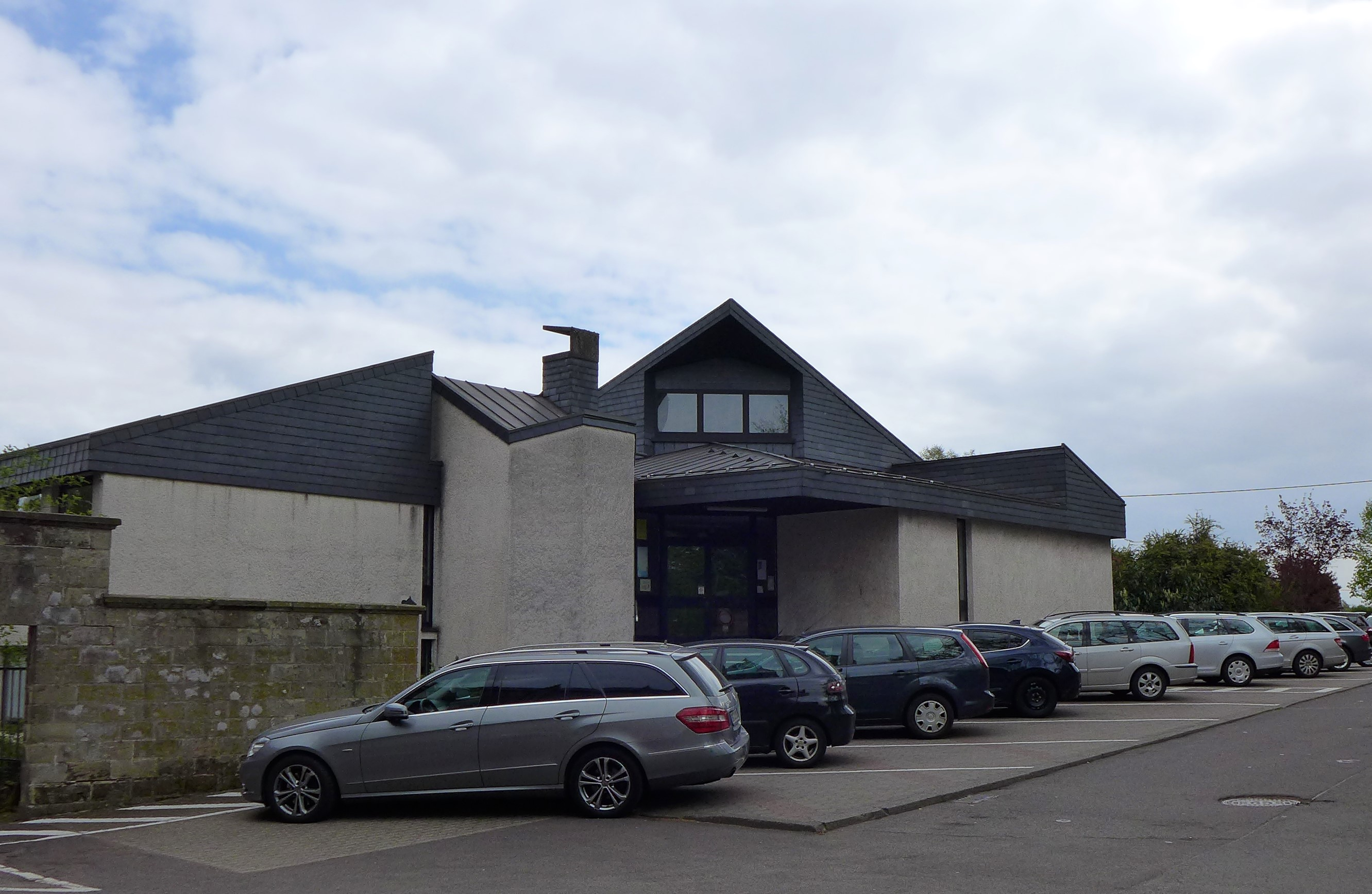 Wallerfangen, Pfarrheim St. Katharina